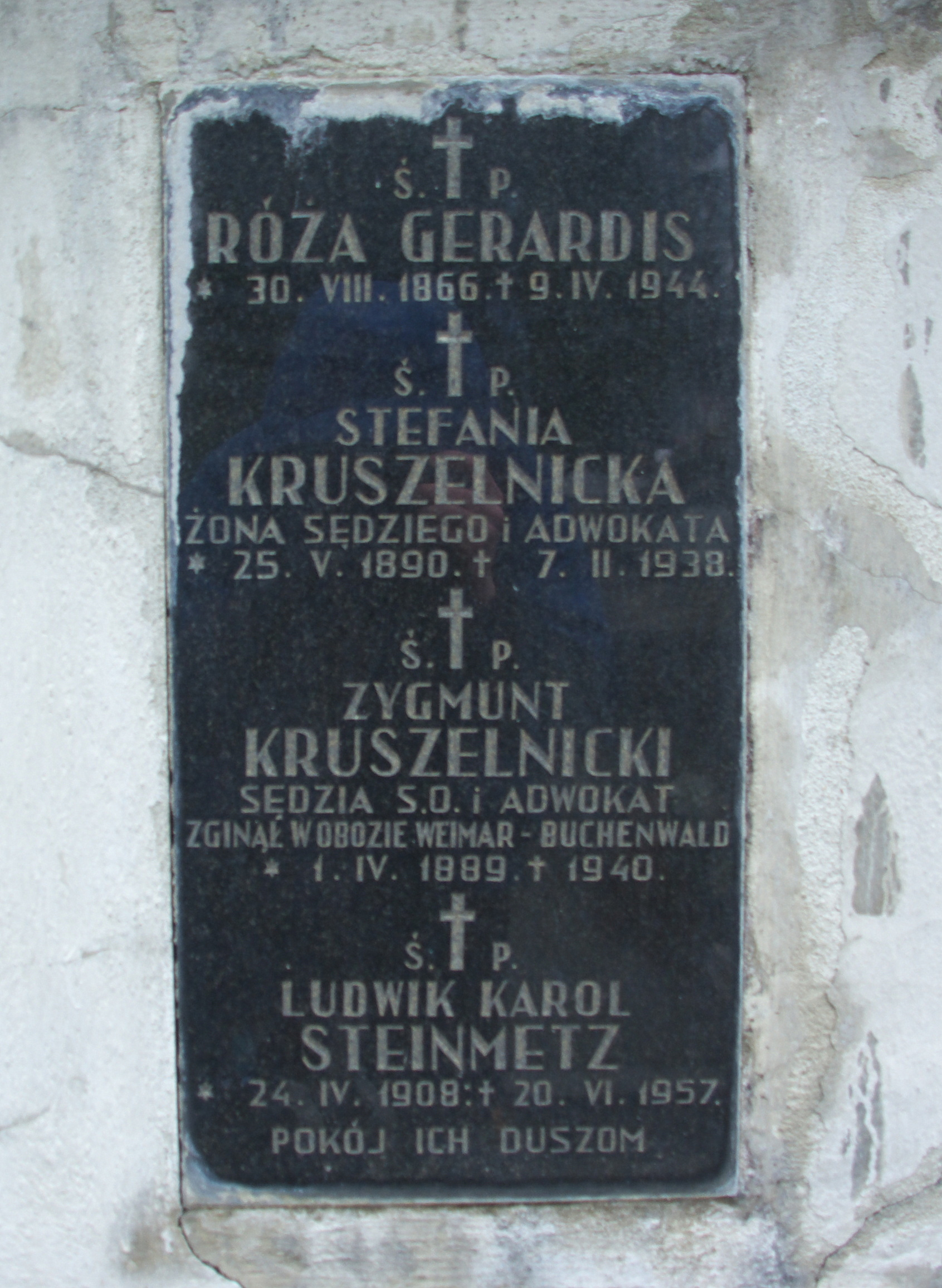 Grobowiec rodziny Gerardis i Pajączkowski na Cmentarzu Centralnym w Sanoku.